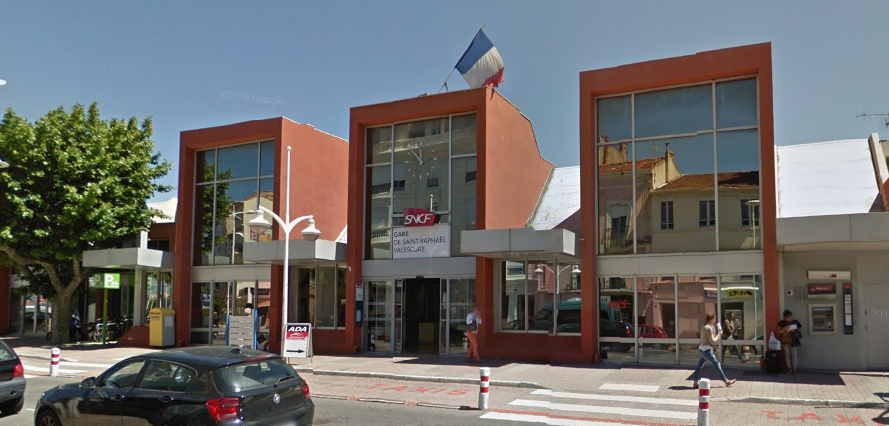 gare